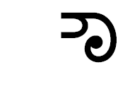 оутваву